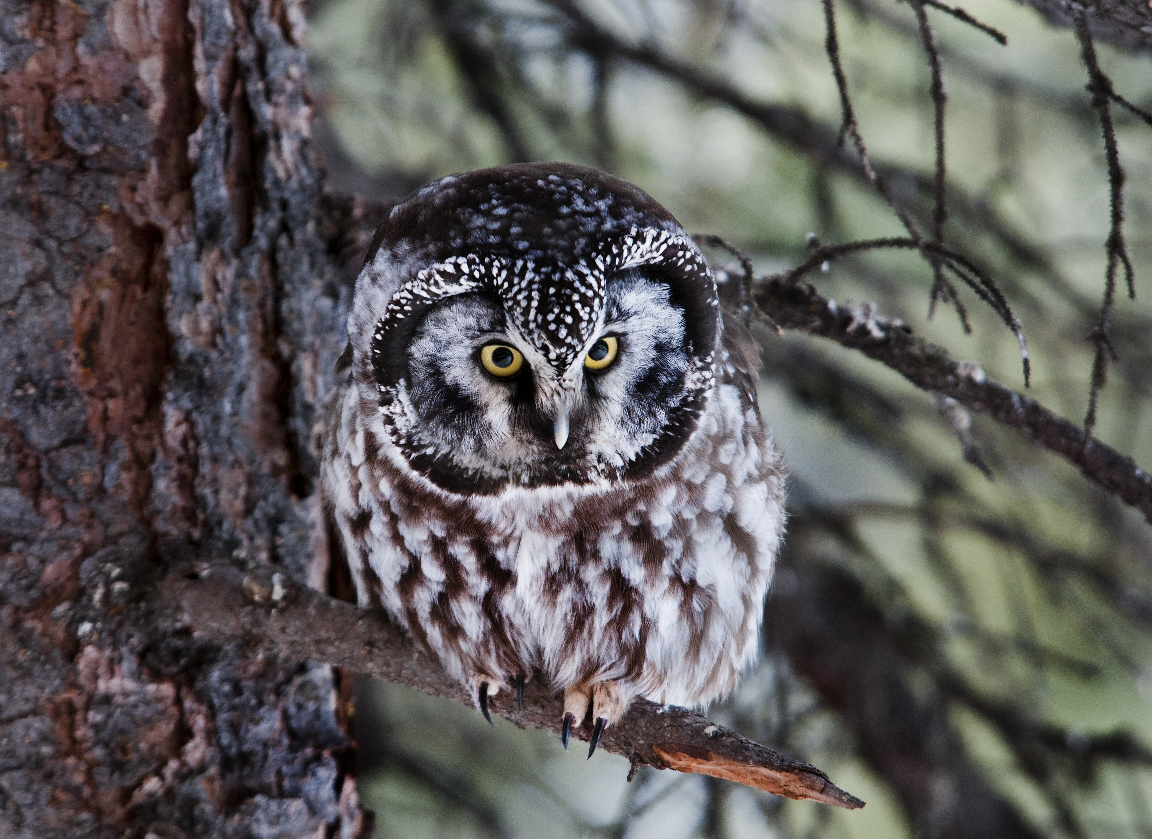 Aegolius funereus, Denali National Park, Alaska.